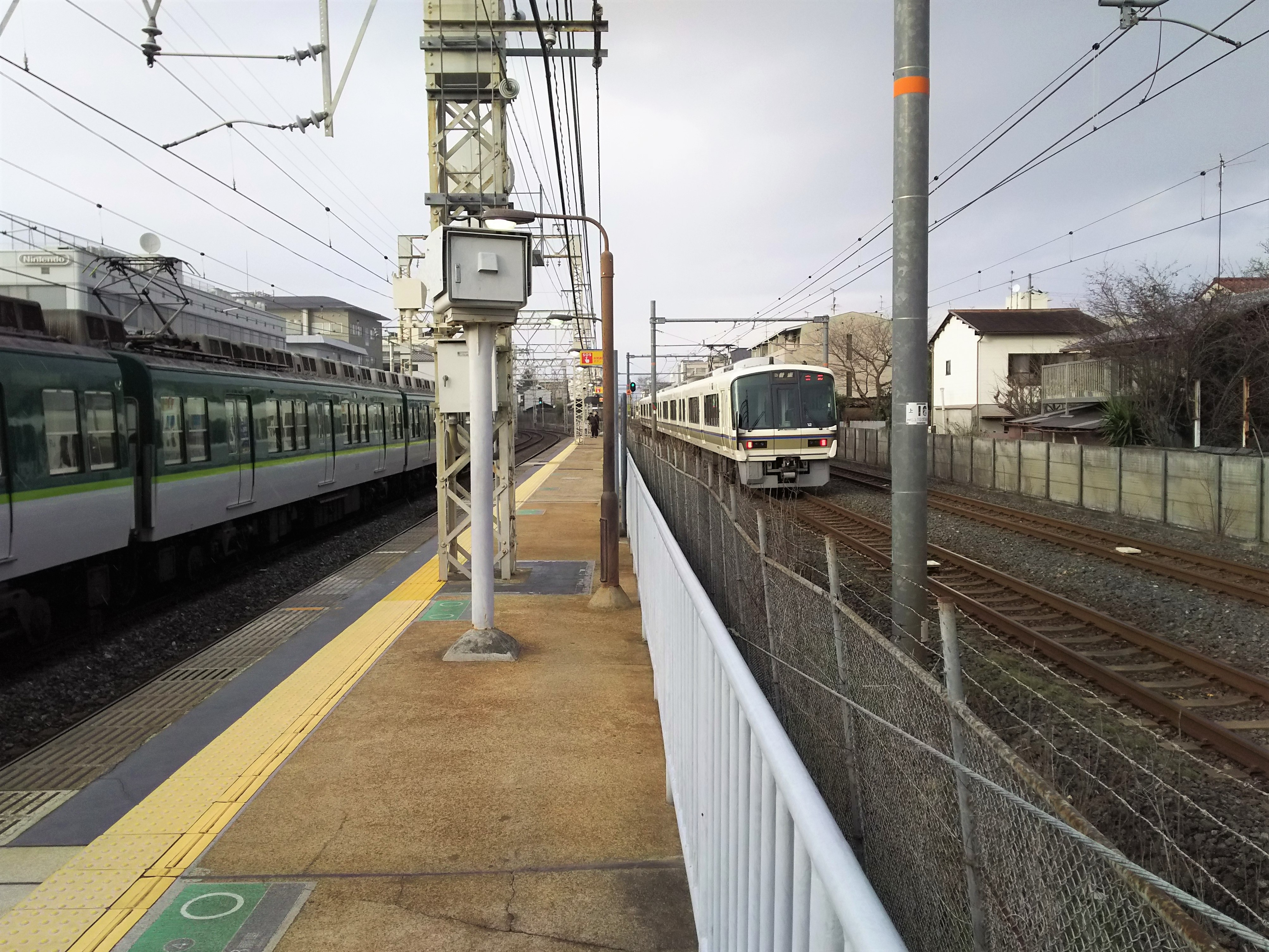 京阪本線鳥羽街道駅プラットホーム（京都市東山区）